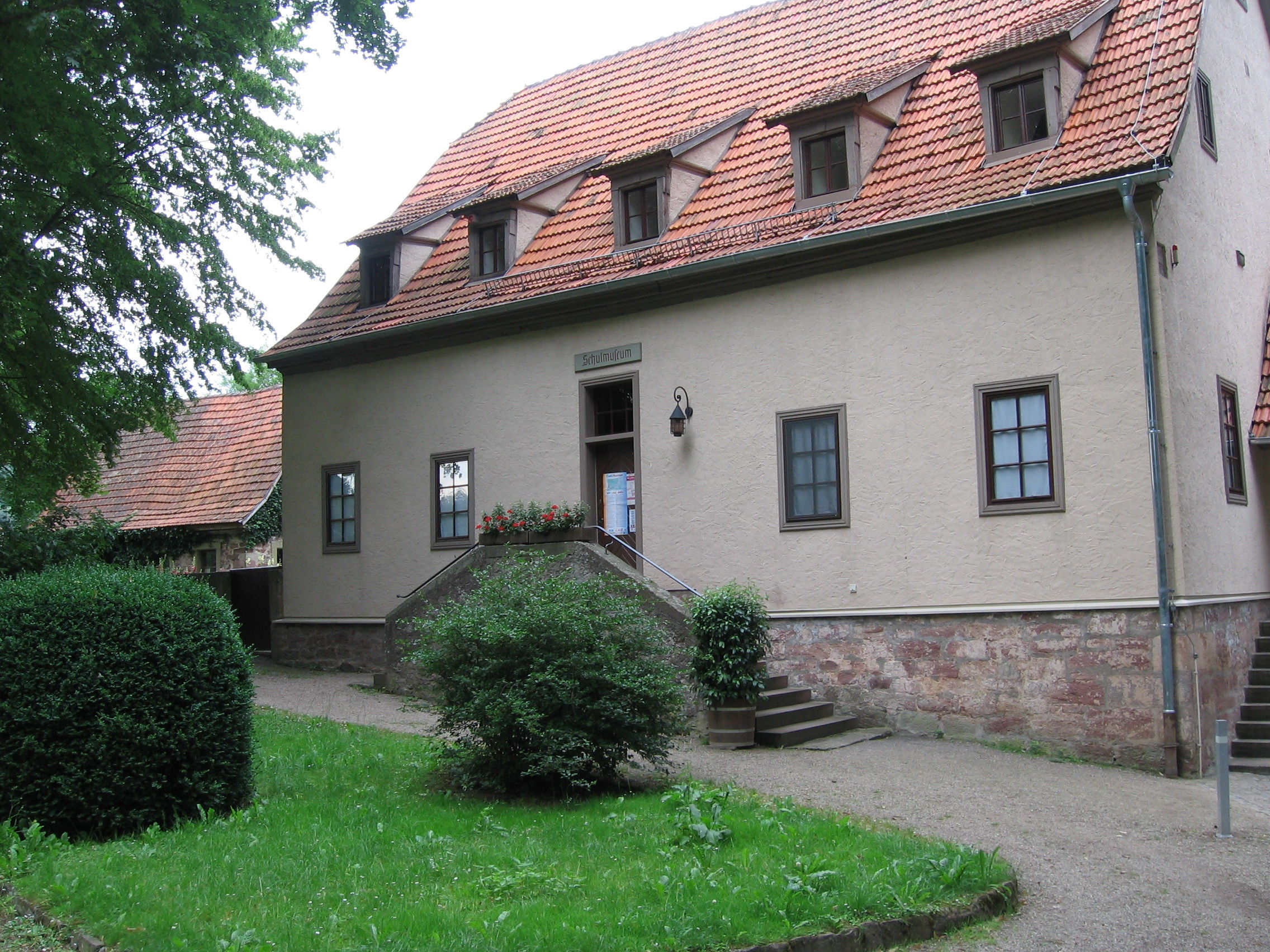 School Museum (Aschach/Ufr.)